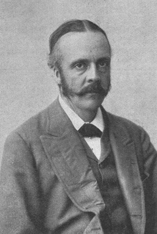 Arthur Balfour (1848-1930) im Jahr 1902.